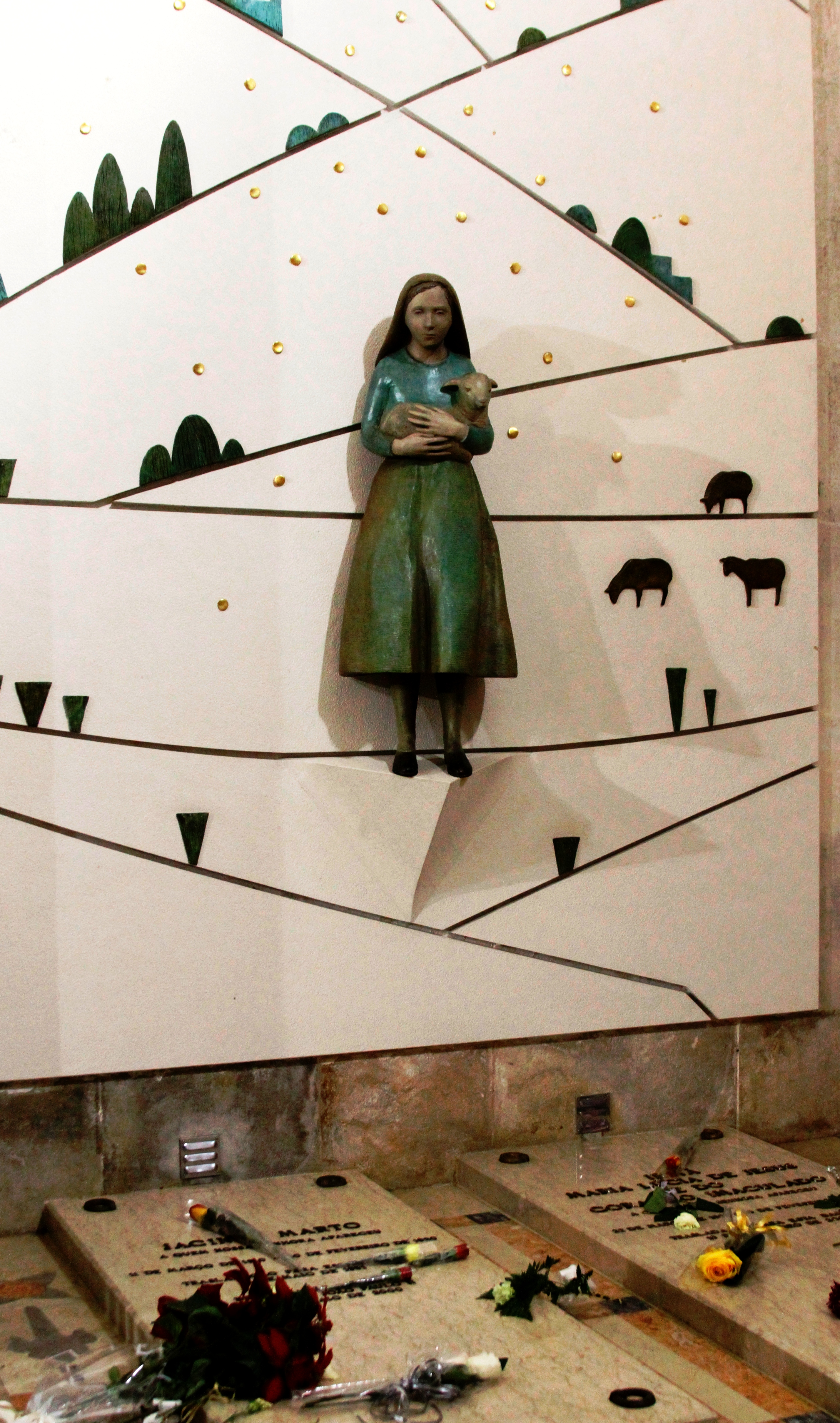 Túmulo